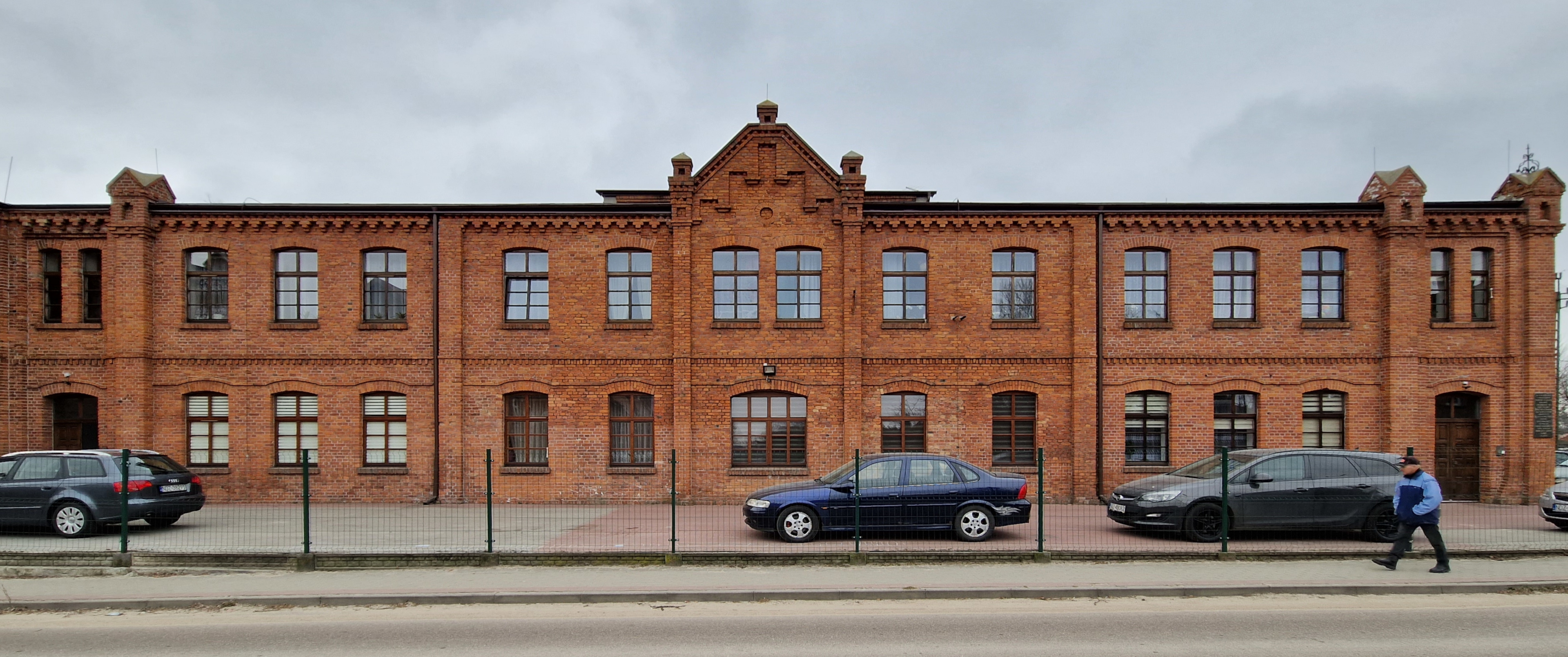 Iłowo-Osada - Budynek, w którym po II wojnie światowej mieściła się Zasadnicza Szkoła Zawodowa, a wcześniej (przed wojną) Towarzystwo Okrętowe (zajmujące się emigrantami z terenów Polski do Ameryki) oraz (w czasie okupacji hitlerowskiej) budynek zajmowany służby SS (obok znajdował się przejściowy obóz hitlerowski).